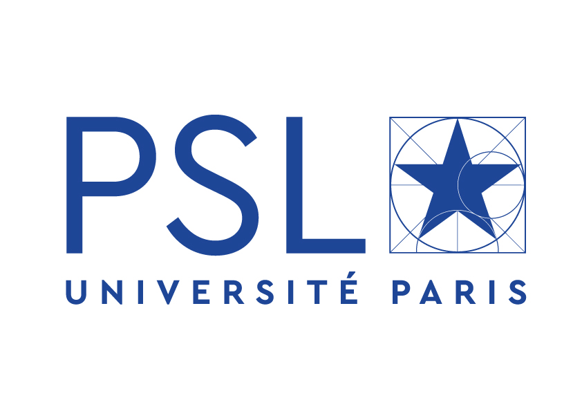 logo de l'Université PSL